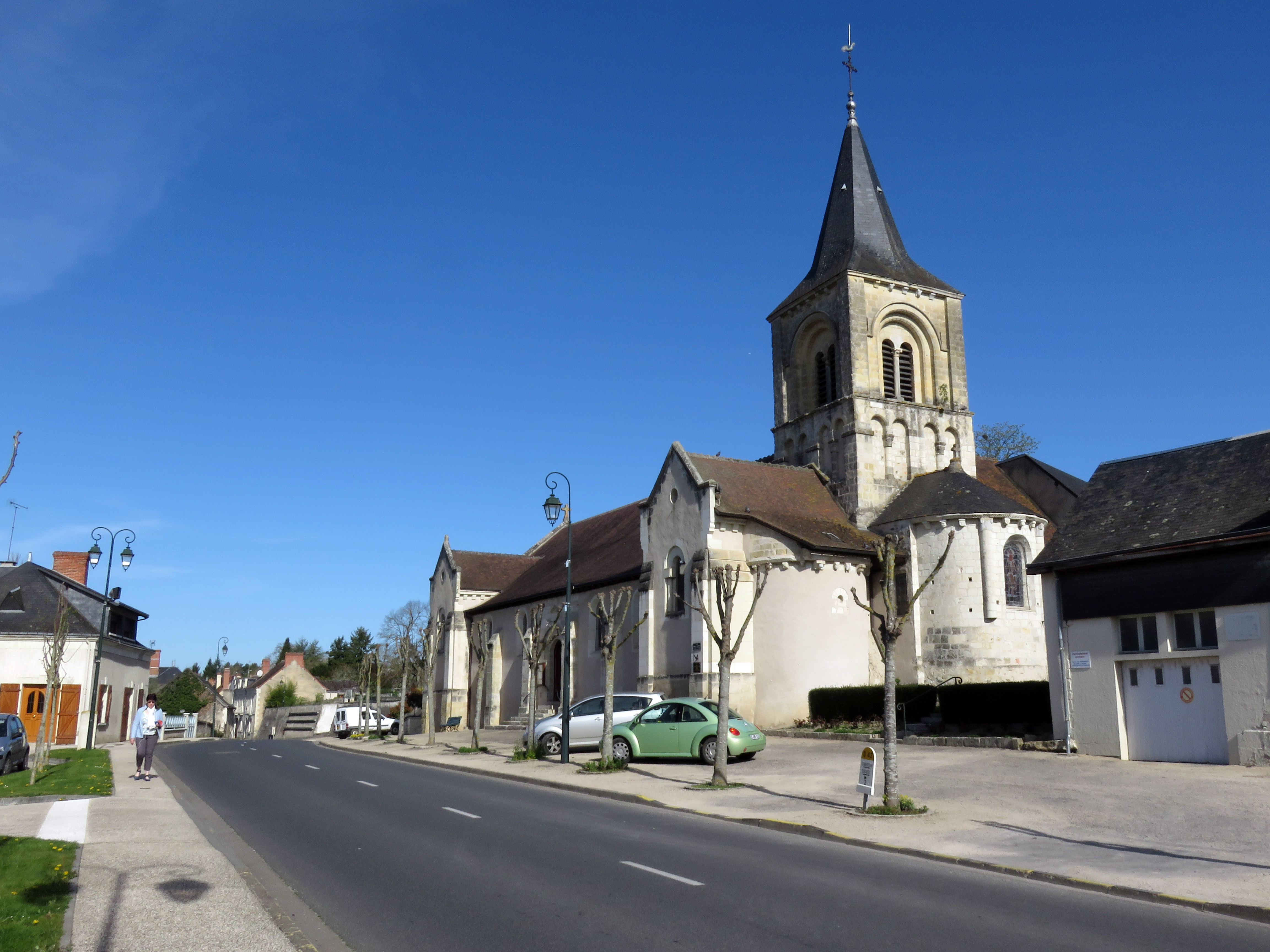 L'église d'Abilly